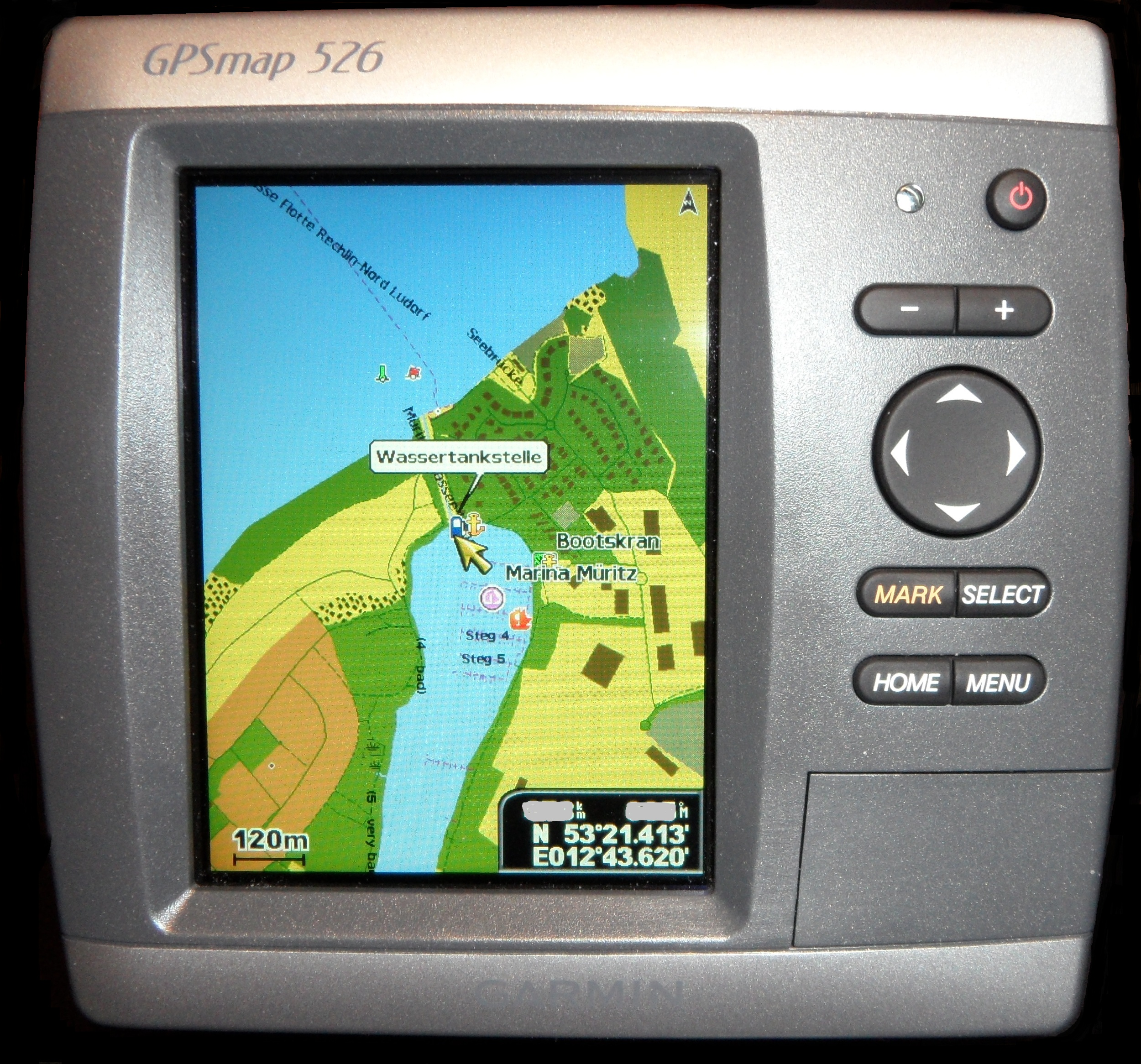 OpenSeaMap_auf_Garmin-Kartenplotter_GPSmap526_Screen_1.jpg